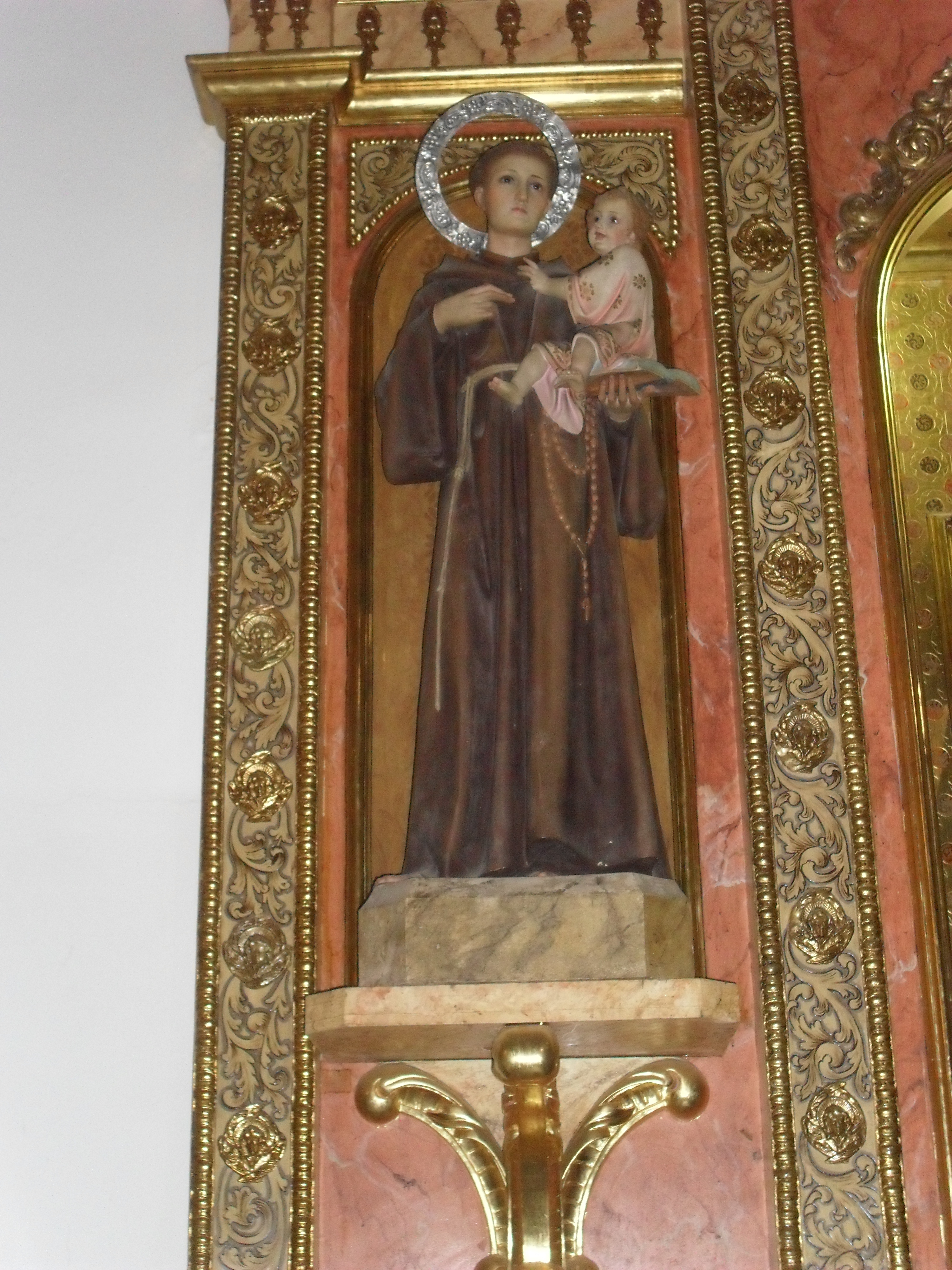 San Antonio de la Iglesia parroquial de Ntra. Sra. del Rosario, en Roquetas de Mar.